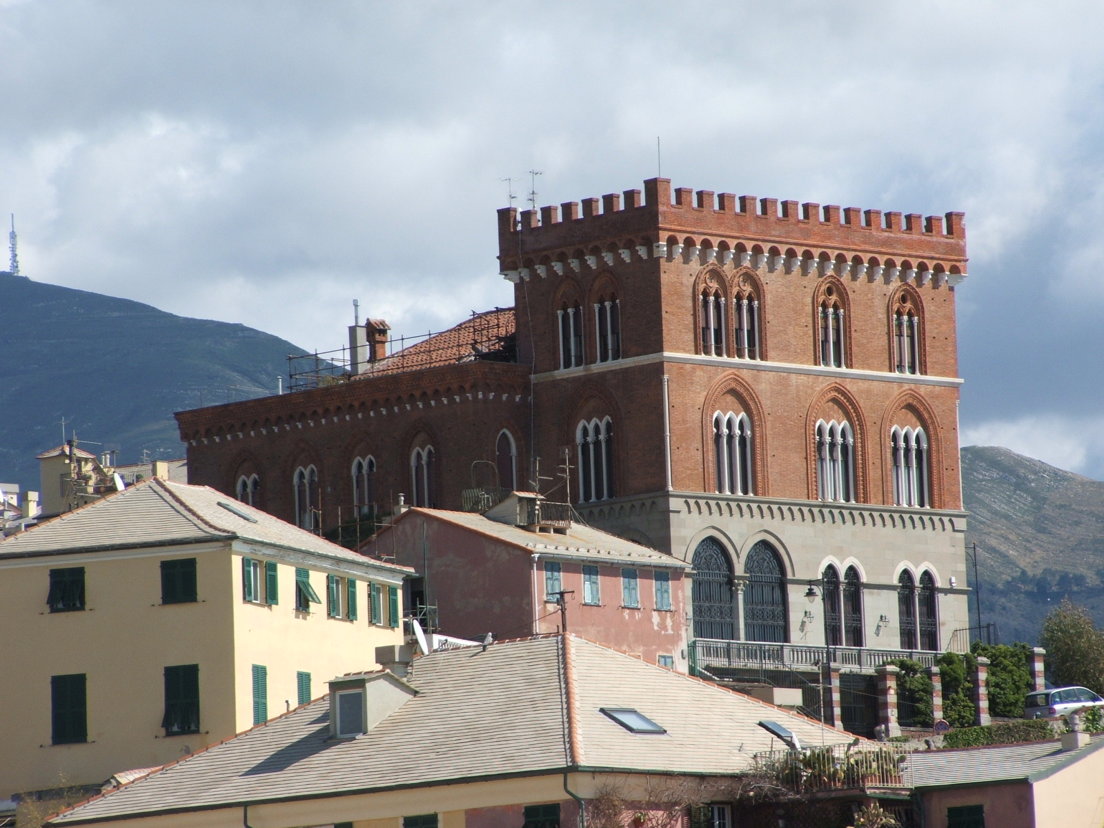 Immagine da Genova - Corso Italia - Boccadasse